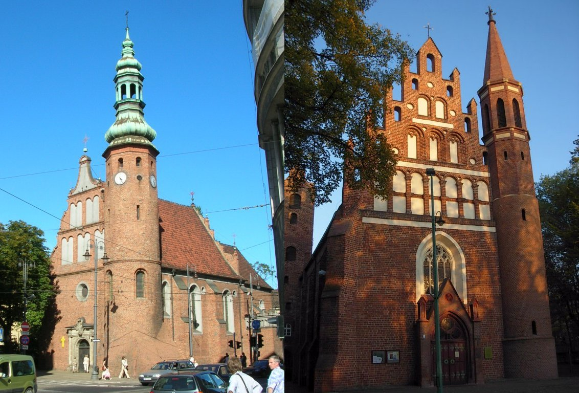 Kościoły Bydgoszczy: pobernardyński (NMP Królowej Pokoju) i klarysek (Wniebowzięcia NMP)